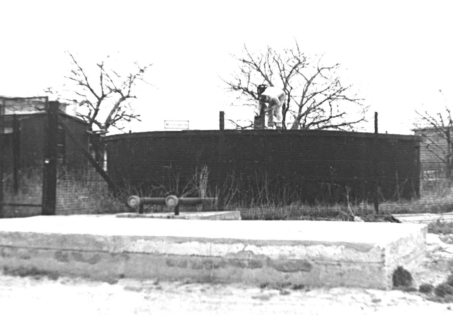 Ansicht der Schachtabdeckelung des Schachtes Oberröblingen im Jahre 1978